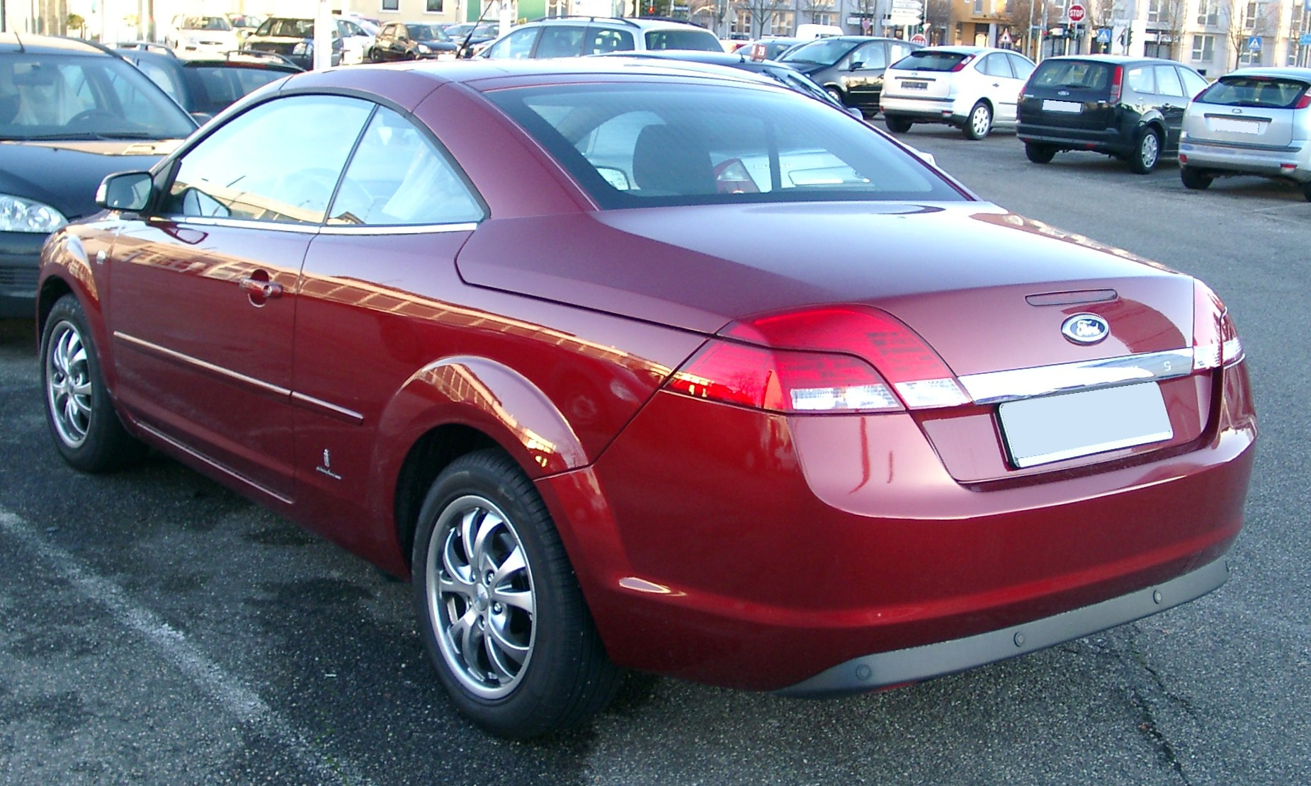 Ford Focus, zweitürig